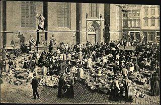 Lutherdenkmal Hannover und Marktszene 1910